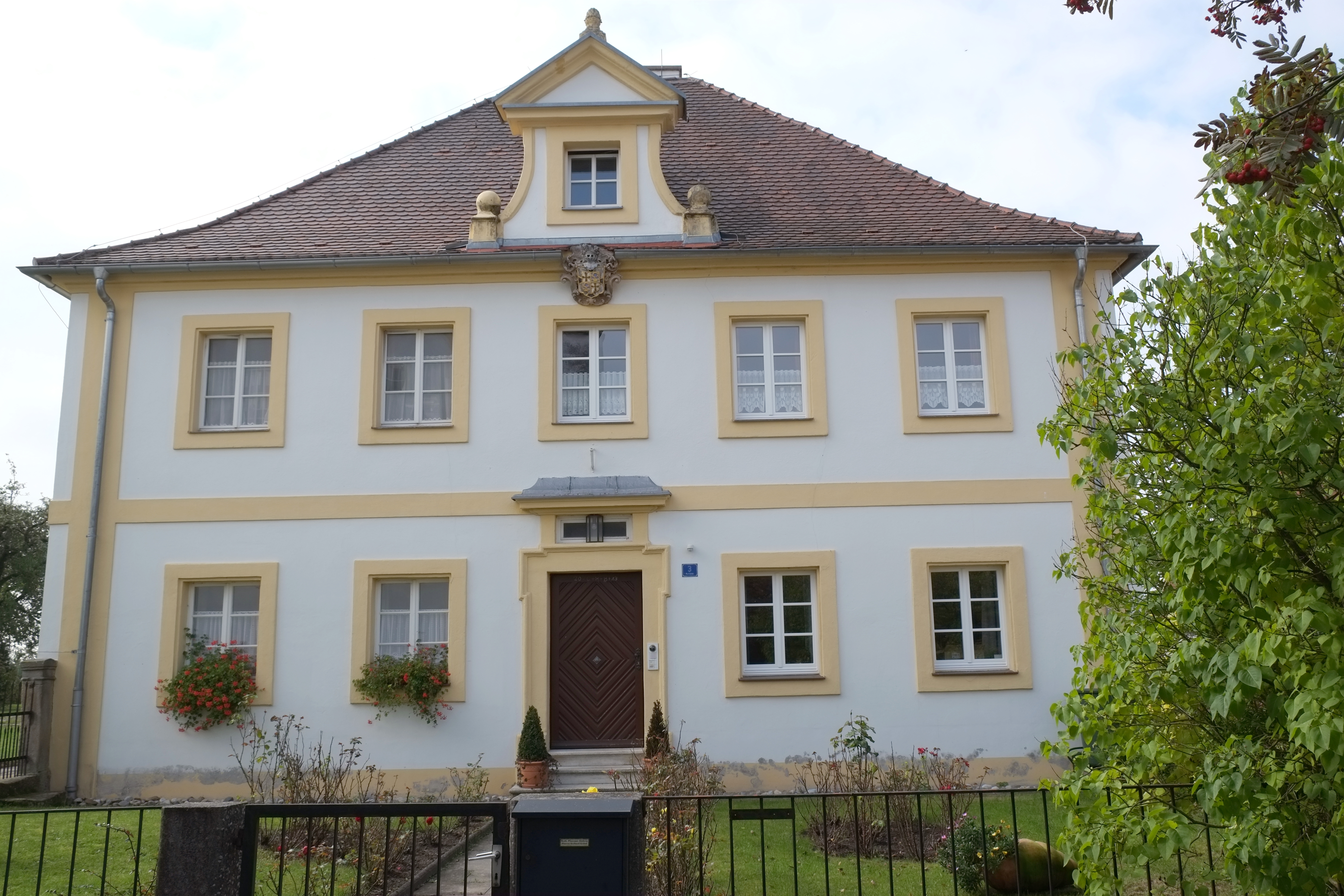 Evangelisch-Lutherischer Pfarrhof in Absberg im Landkreis Weißenburg-Gunzenhausen (Bayern/Deutschland)